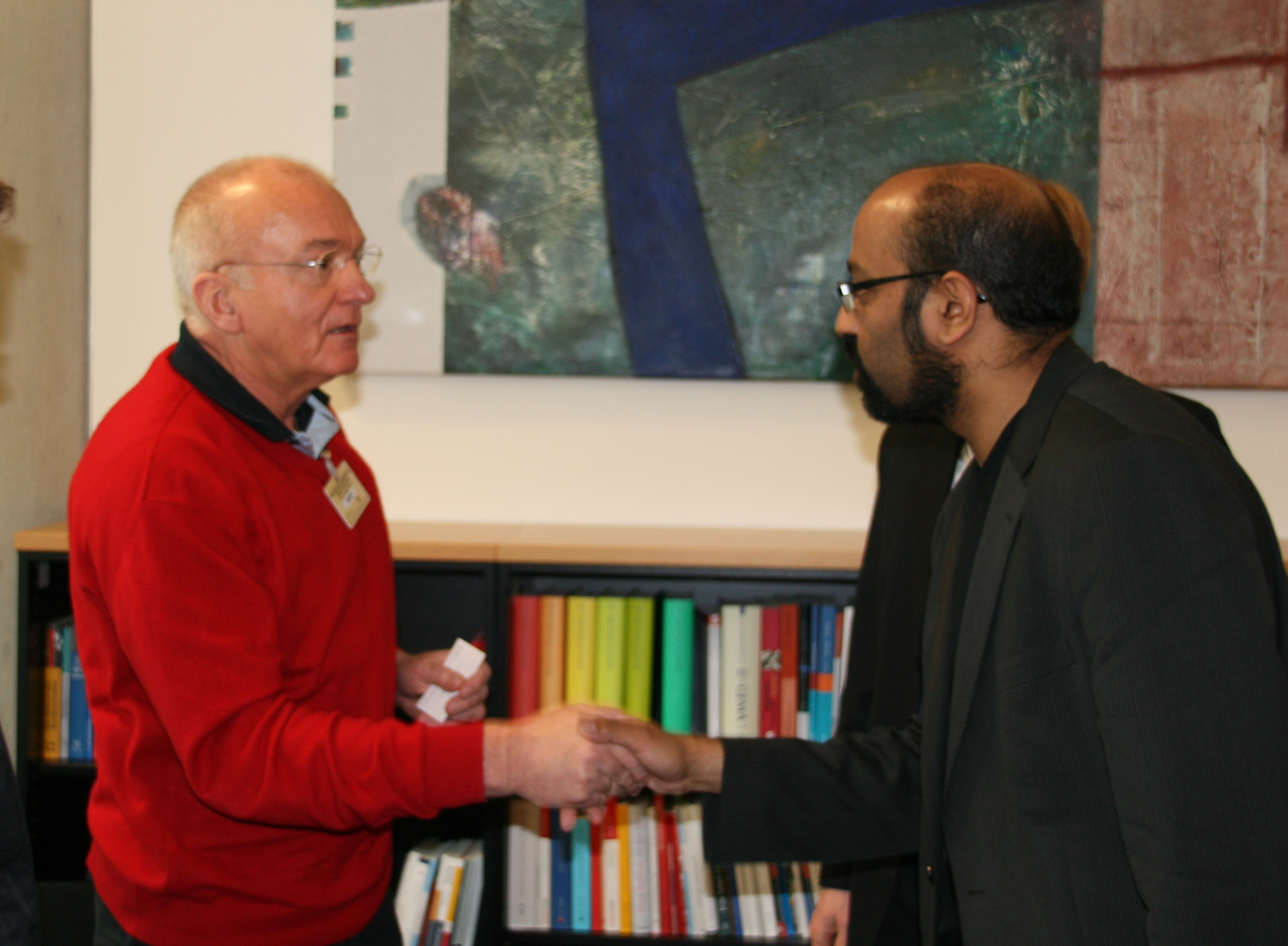 Norbert Denef, netzwerkB, Barbara Blaine, Barbara Dorris, SNAP, gemeinsames Treffen im Bundestag am 24. März 2010 mit Josef Winkler, Stellvertretender Fraktionsvorsitzender der Bundesfraktion Bündnis 90/Die Grünen, und Siegmund Ehrmann, Beauftragter der SPD-Bundestagsfraktion für Kirchen und Religionsgemeinschaften.